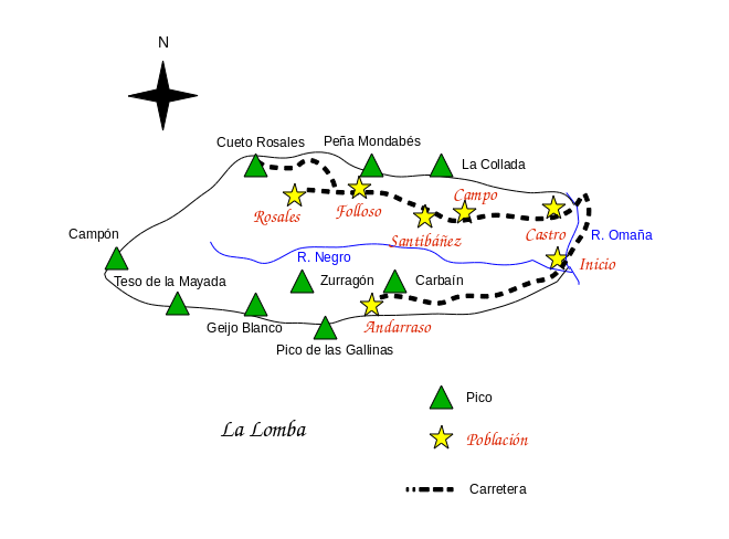 Croquis de la Lomba de Campestedo en la provincia de León (España)